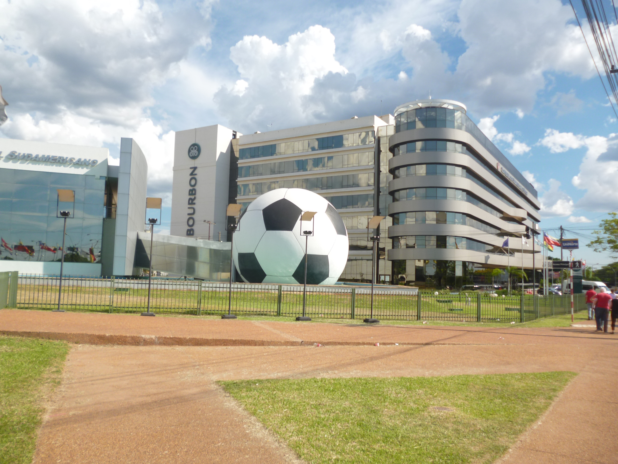 Costado del denominado oficialmente como 'Bourbon Conmebol Convention Hotel', situado en Luque, Paraguay, en inmediaciones de las oficinas de la Confederación Sudamericana de Fútbol. Por detrás, pegado a éste, se observa el Museo de la Conmebol.